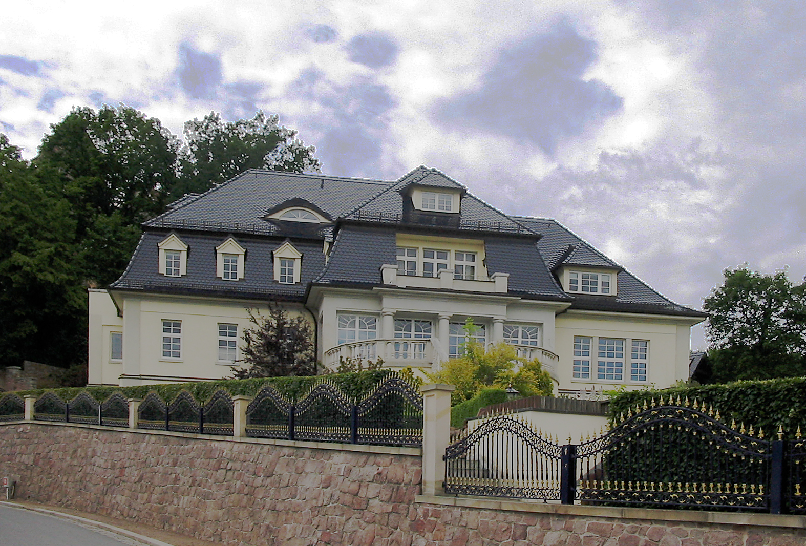 Radebeul, Villenkolonie Altfriedstein, Landhaus Franz Hartung